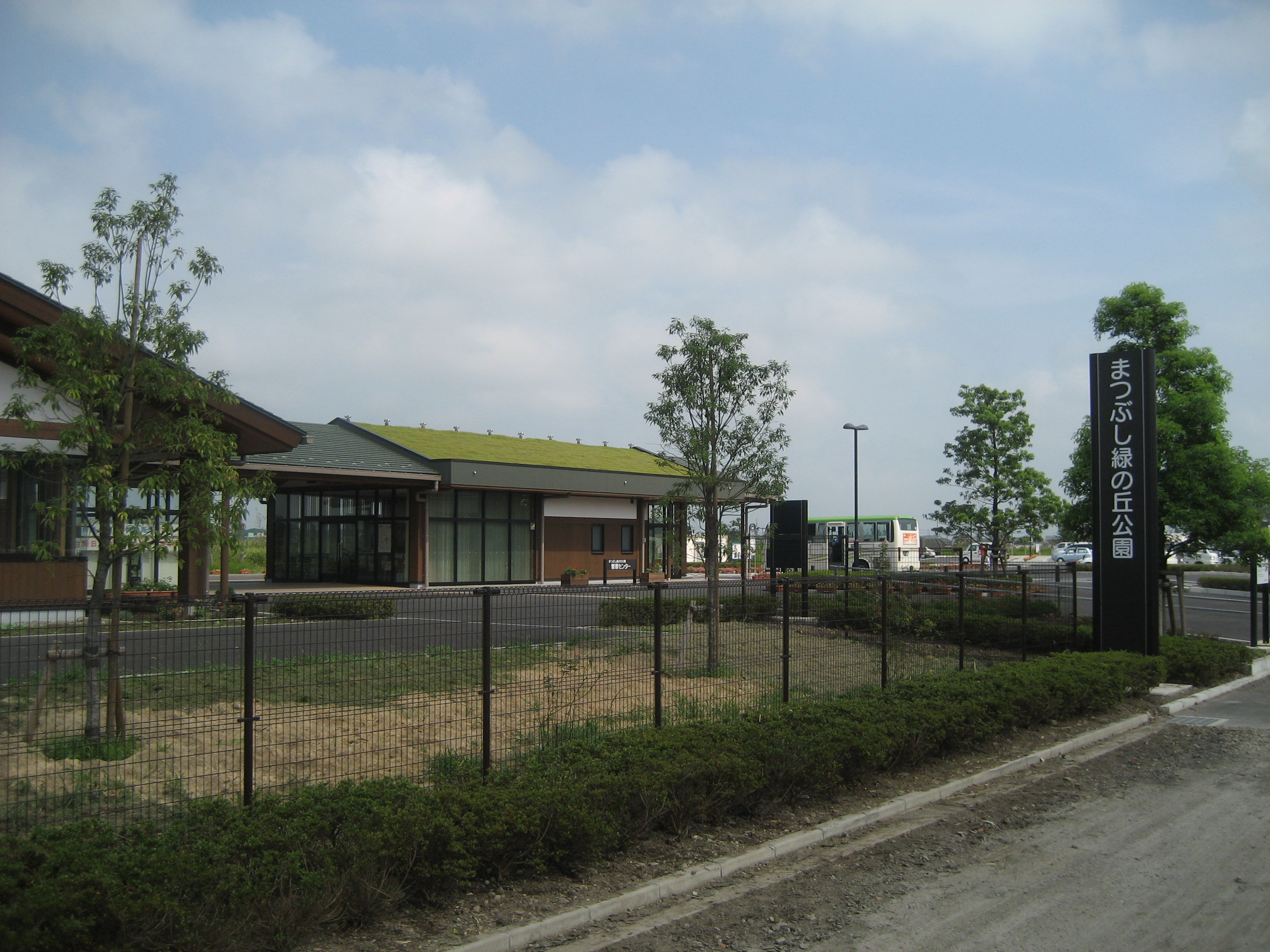 埼玉県営まつぶし緑の丘公園正面